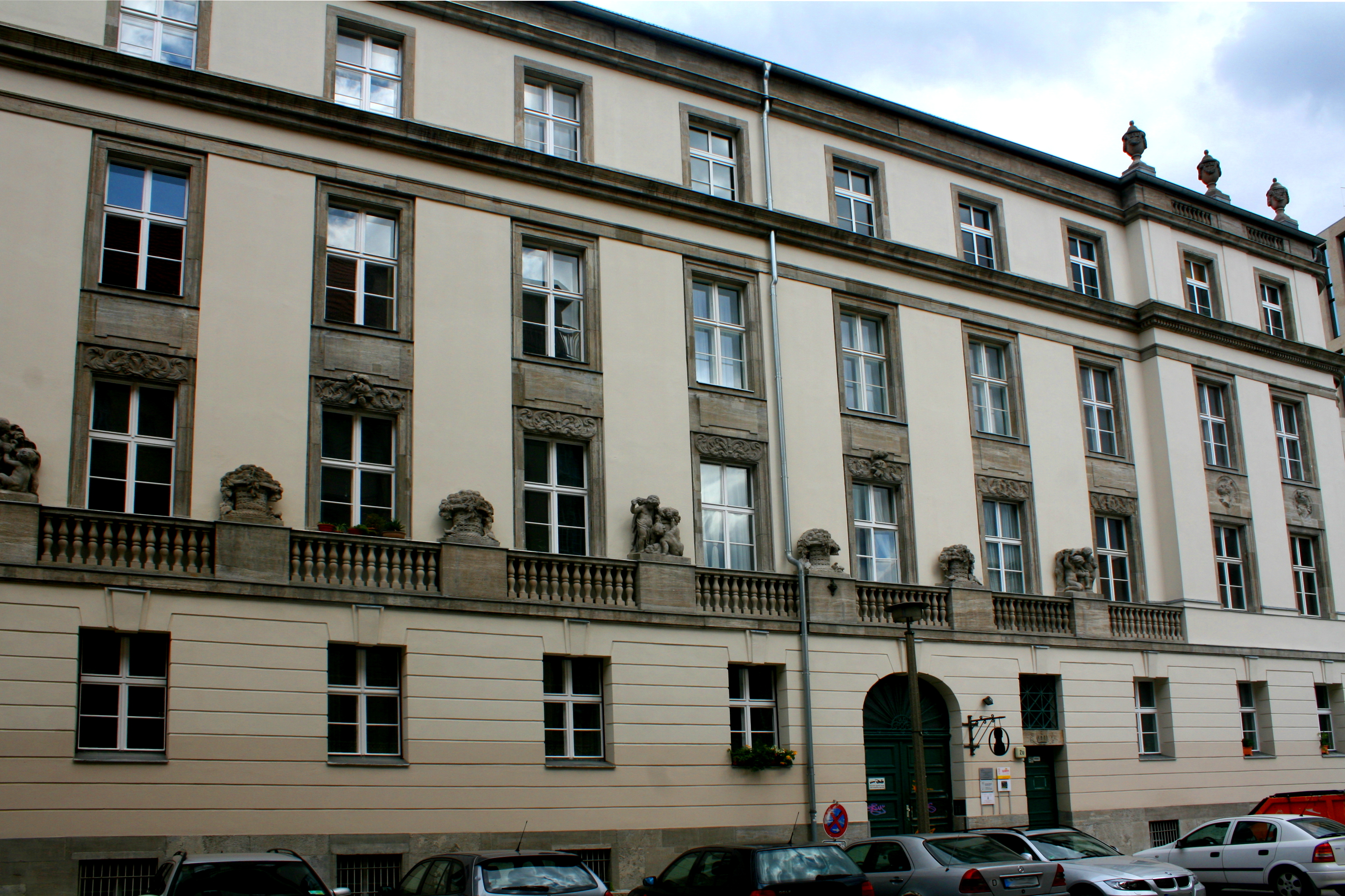 Fassade des denkmalgeschützten Gebäudes Planck-Str. 20 in Berlin-Mitte, in dem sich unter anderem das Quäkerbüro Berlin befindet.